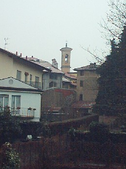 Panorama di Bisuschio con campanile della chiesa di San Giuseppe. Foto personale. Novembre 2005.